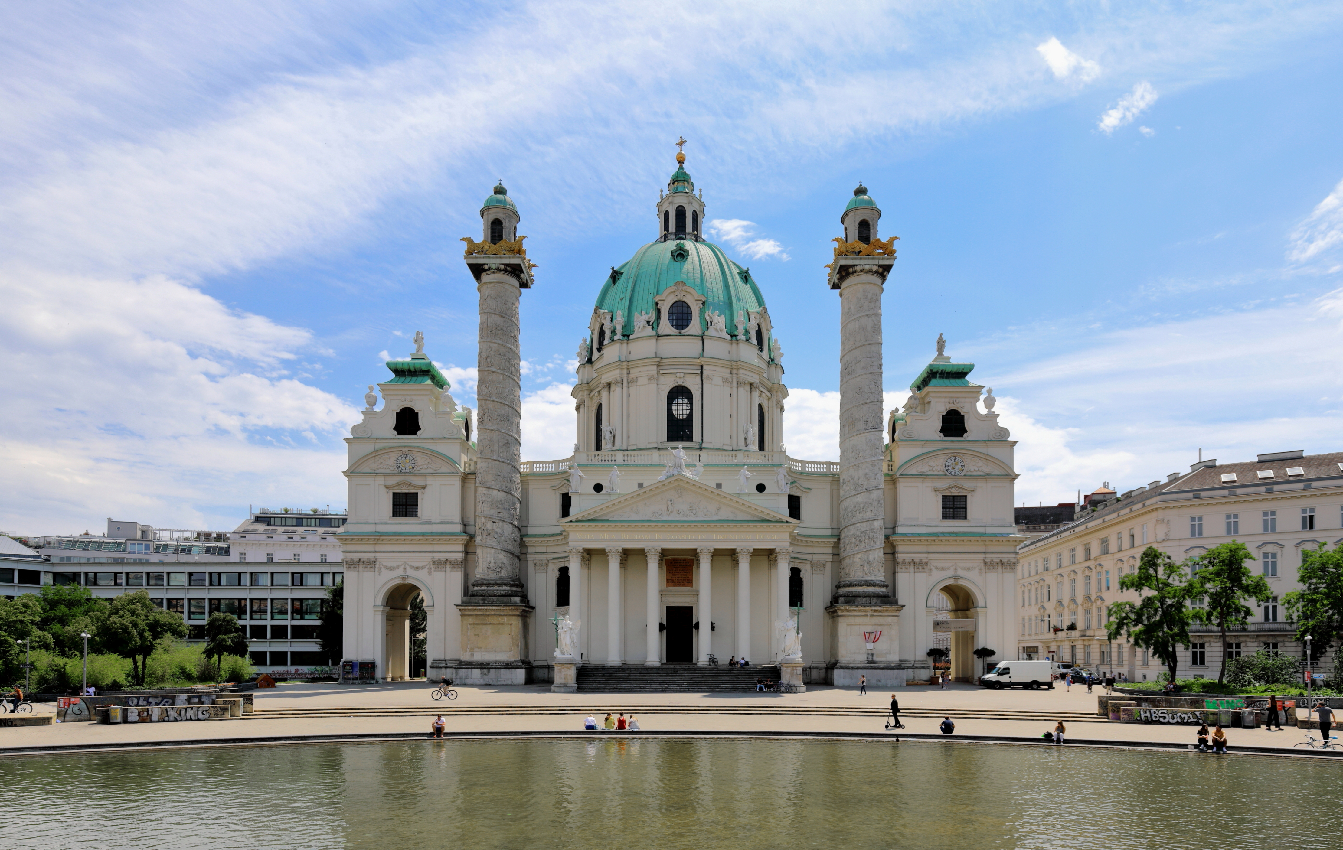 Die Karlskirche am Karlsplatz im 4. Wiener Gemeindebezirk Wieden.Die Kirche, dem heiligen Karl Borromäus geweiht, wurde anlässlich der Einlösung eines von Kaiser Karl VI. während der Pestepidemie am 22. Oktober 1713 bei St. Stephan abgelegten Gelübdes errichtet. Die Grundsteinlegung fand am 4. Februar 1716 statt und am 28. Oktober 1737 erfolgte die Weihe durch Kardinal Sigismund Graf Kollonitsch, wobei die erste Messe in feierlicher Form und in Anwesenheit des Kaisers erst am 24. August 1738 abgehalten wurde. Errichtet wurde die Kirche nach Plänen des Architekten Johann Bernhard Fischer von Erlach. Nach seinem Tod (1723) vollendete sein Sohn Joseph Emanuel Fischer von Erlach mit dem Bauführer Erhard Martinelli den Sakralbau. Die beiden Triumphsäulen sind 33 m hoch, während die Kuppel über dem längsovalen Hauptraum eine Höhe von 72 m erreicht.